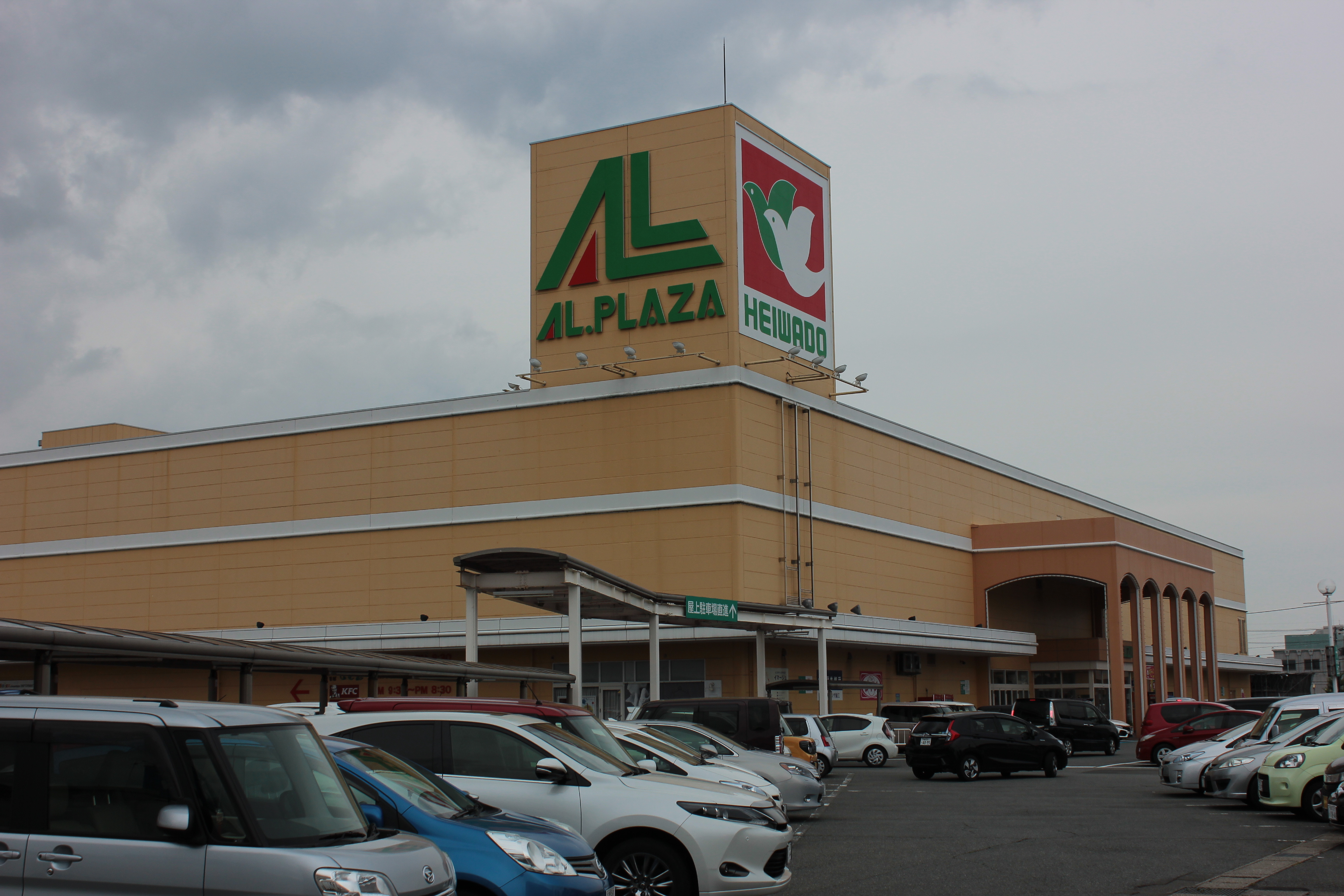 アル・プラザ鯖江（福井県鯖江市） Canon EOS Kiss X5